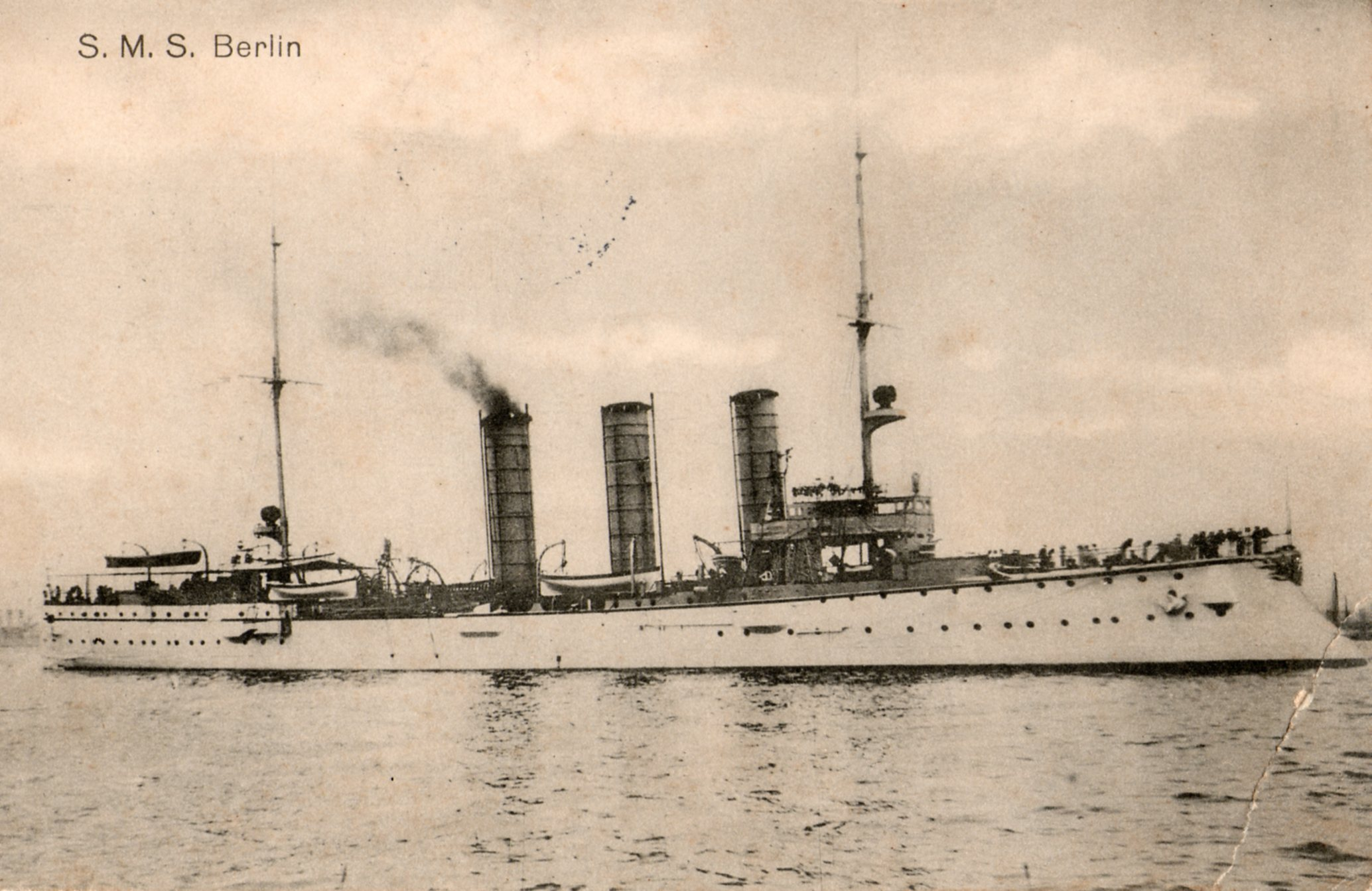 Kleiner Kreuzer SMS BERLIN. Feldpostkarte von Georg Cording, Vorpostendampfer VÖRWÄRTS, vom 28. Mai 1915 an Mariechen Westerholt, Osternburg i. Gr.